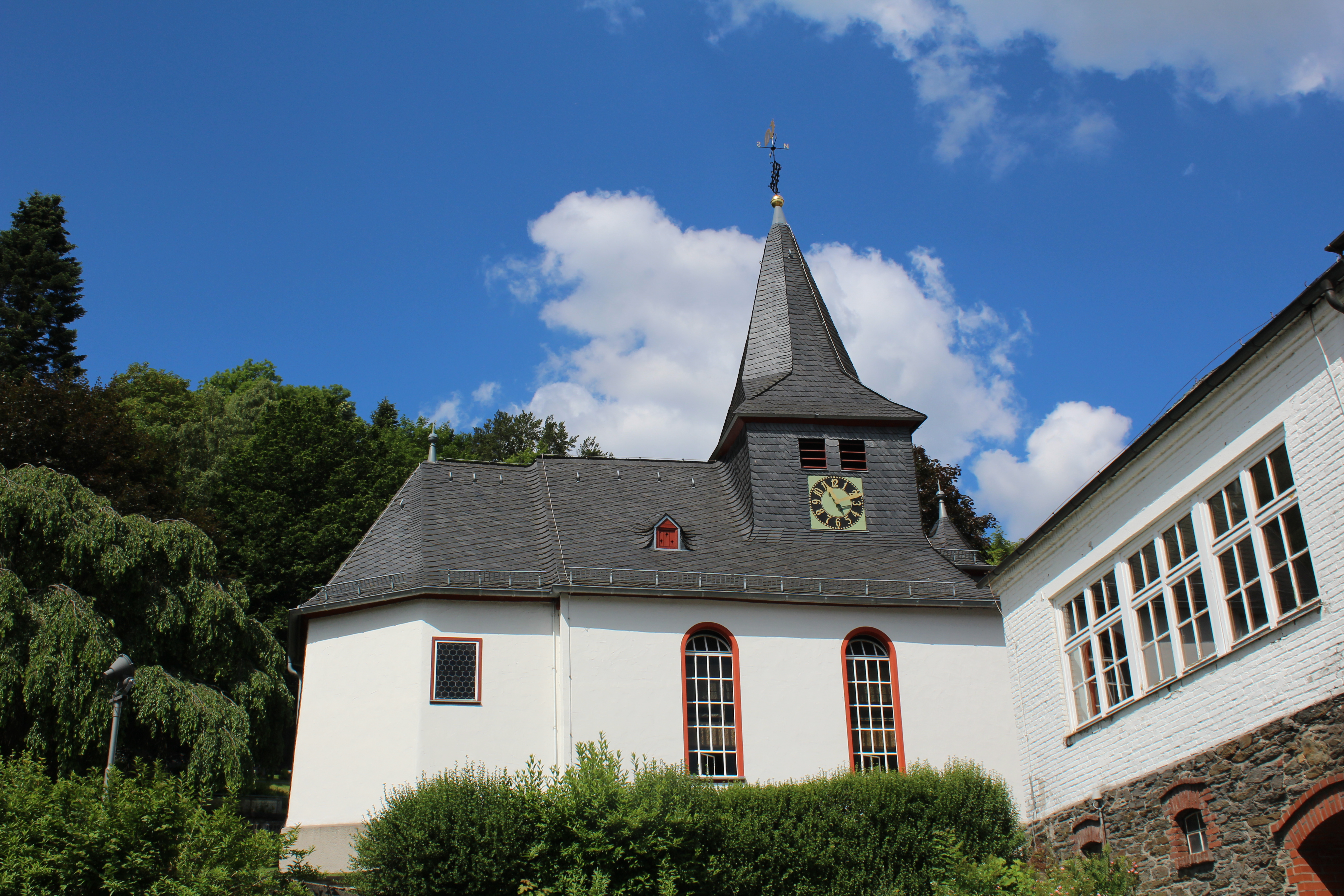 Ev. Kapelle Steinbrücken, Gemeinde Dietzhölztal, Hessen, Deutschland